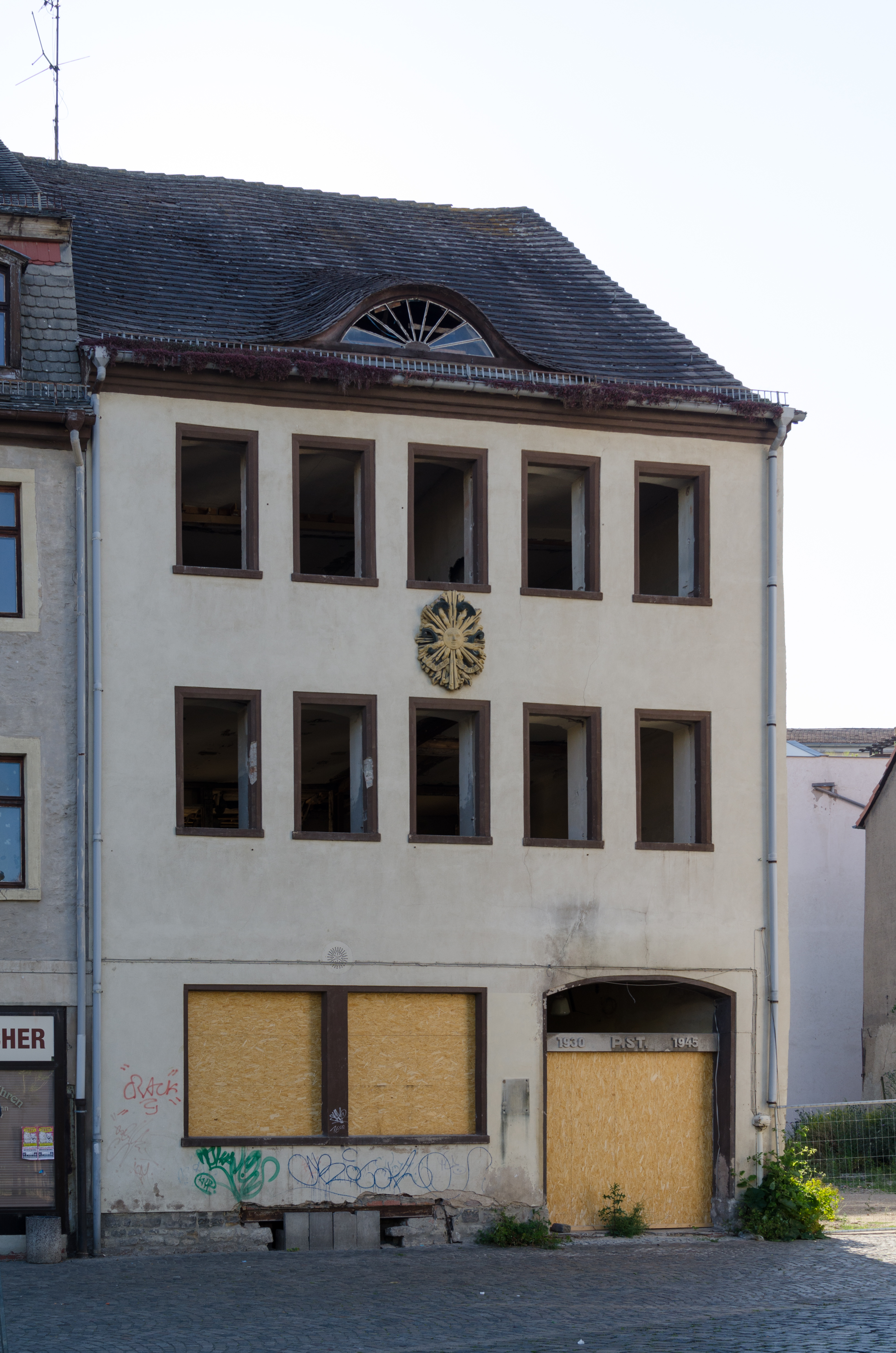 Merseburg, Markt 14